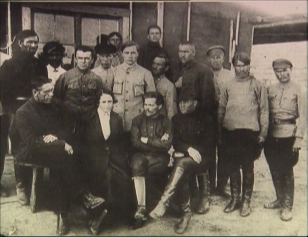 Штаб Української революційної повстанської армії, передній ряд зліва направо Віктор Белах, Галина Андріївна (дружина Махна), Махно та його два брати Савелій та Григорій (стоячи). ВЕСНА 1919 р. Репродукція фотографії, представленої у документальному фільмі «Нестор Махно, селянин України» Гелен Шатлейн, на 52-й хвилині.